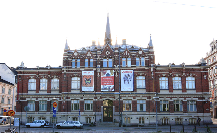 Designmuseo, Korkeavuorenkatu 23, Helsinki. Arkkitehti: Gustaf Nyström, 1895.